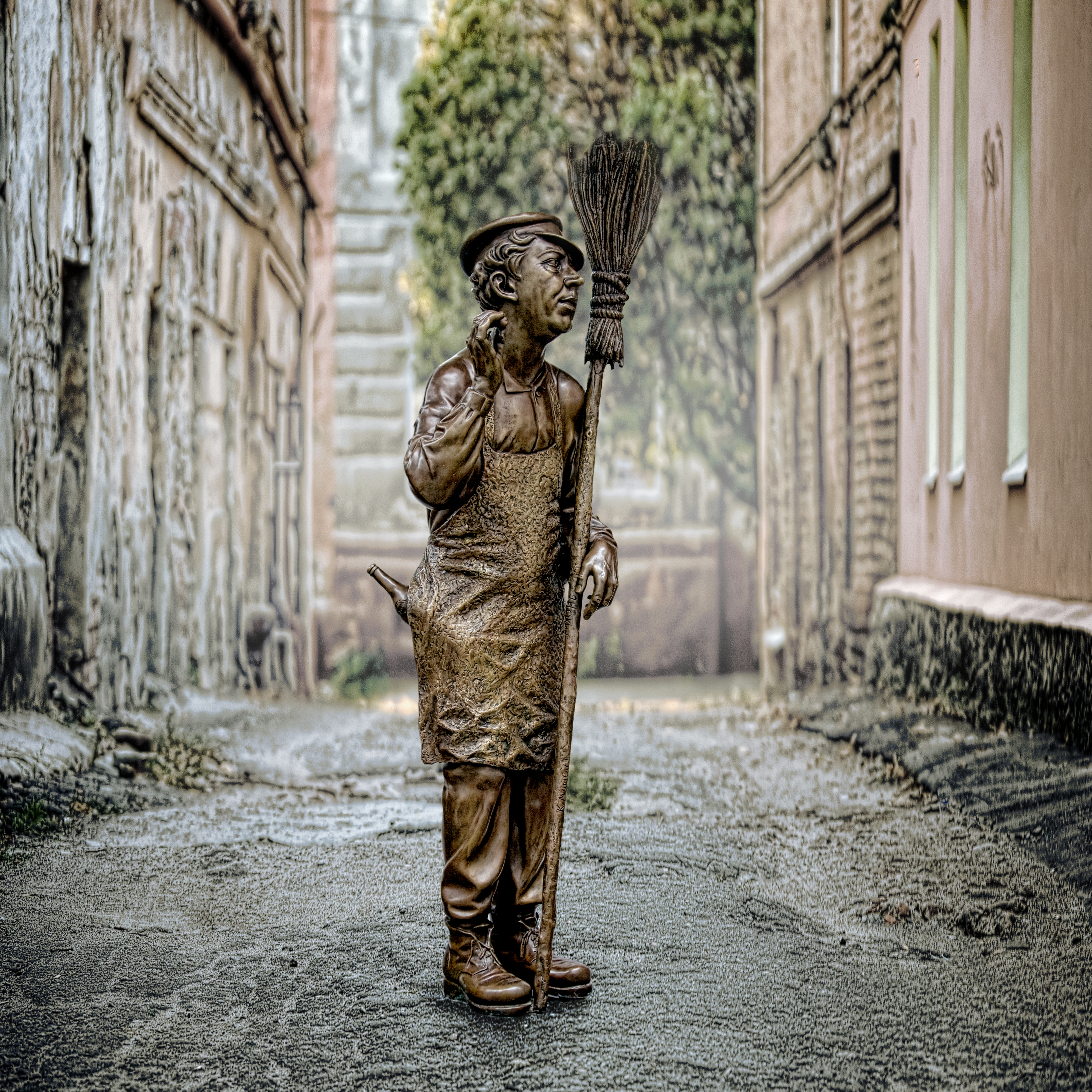 Памятник Юрию Никулину в образе дворника Тихона. Автор Катиб Мамедов